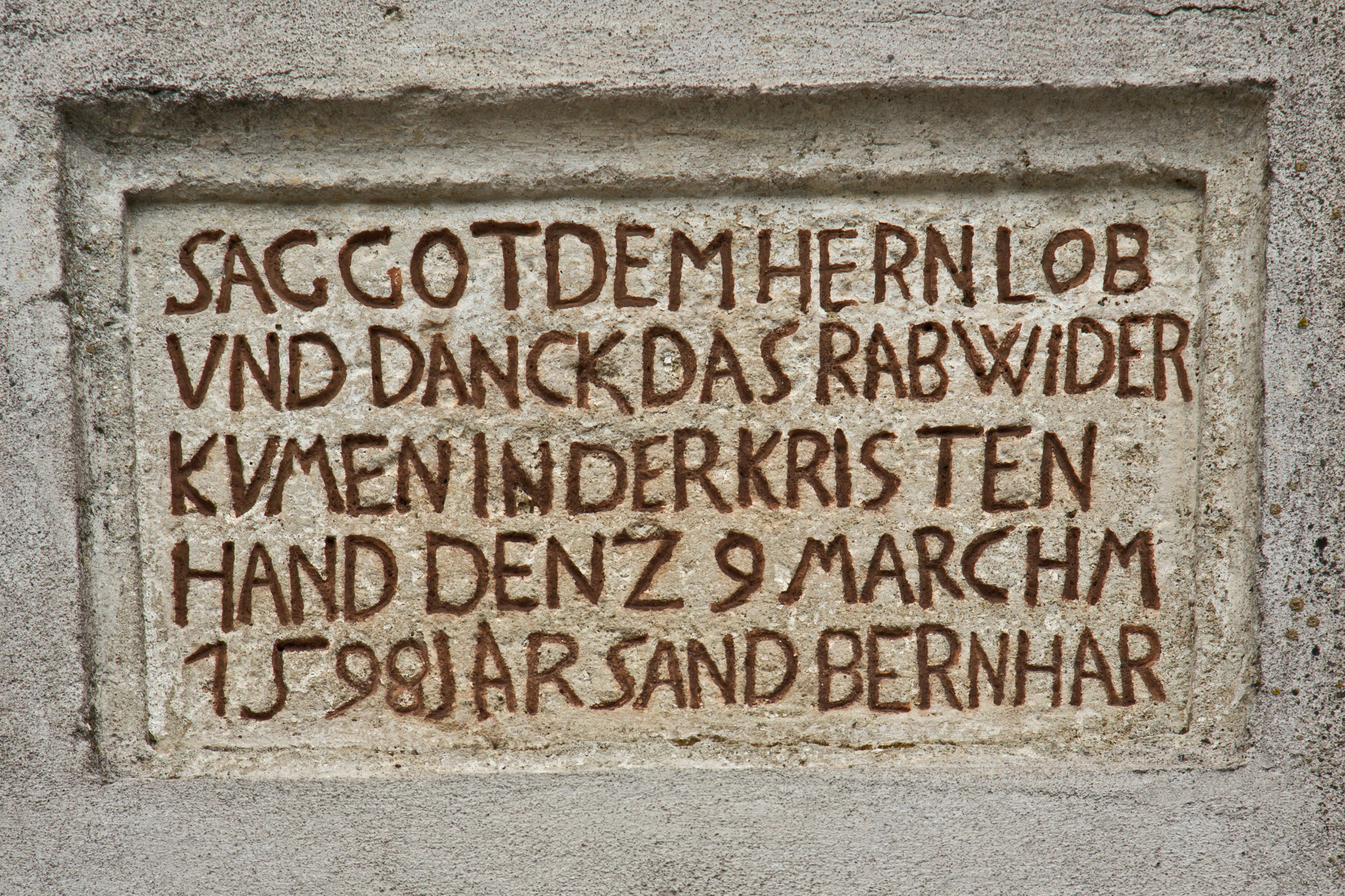 Das Raaberkreuz ist ein abgefaster Tabernakelpfeiler westlich des Ortes, der inschriftlich mit 1598 bezeichnet ist.